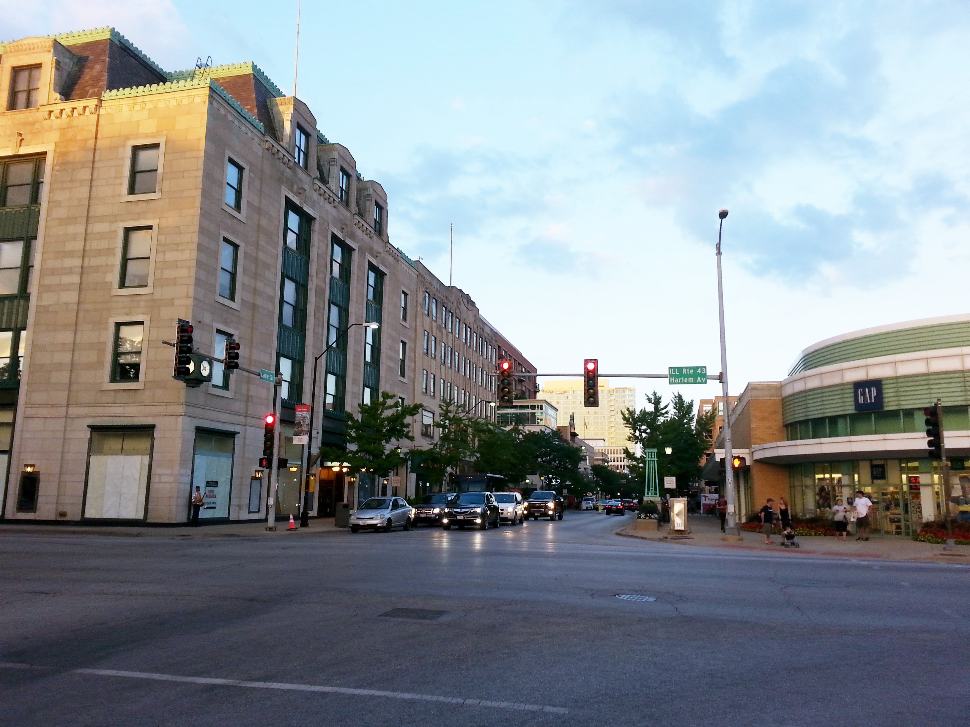 Lake Street at dusk